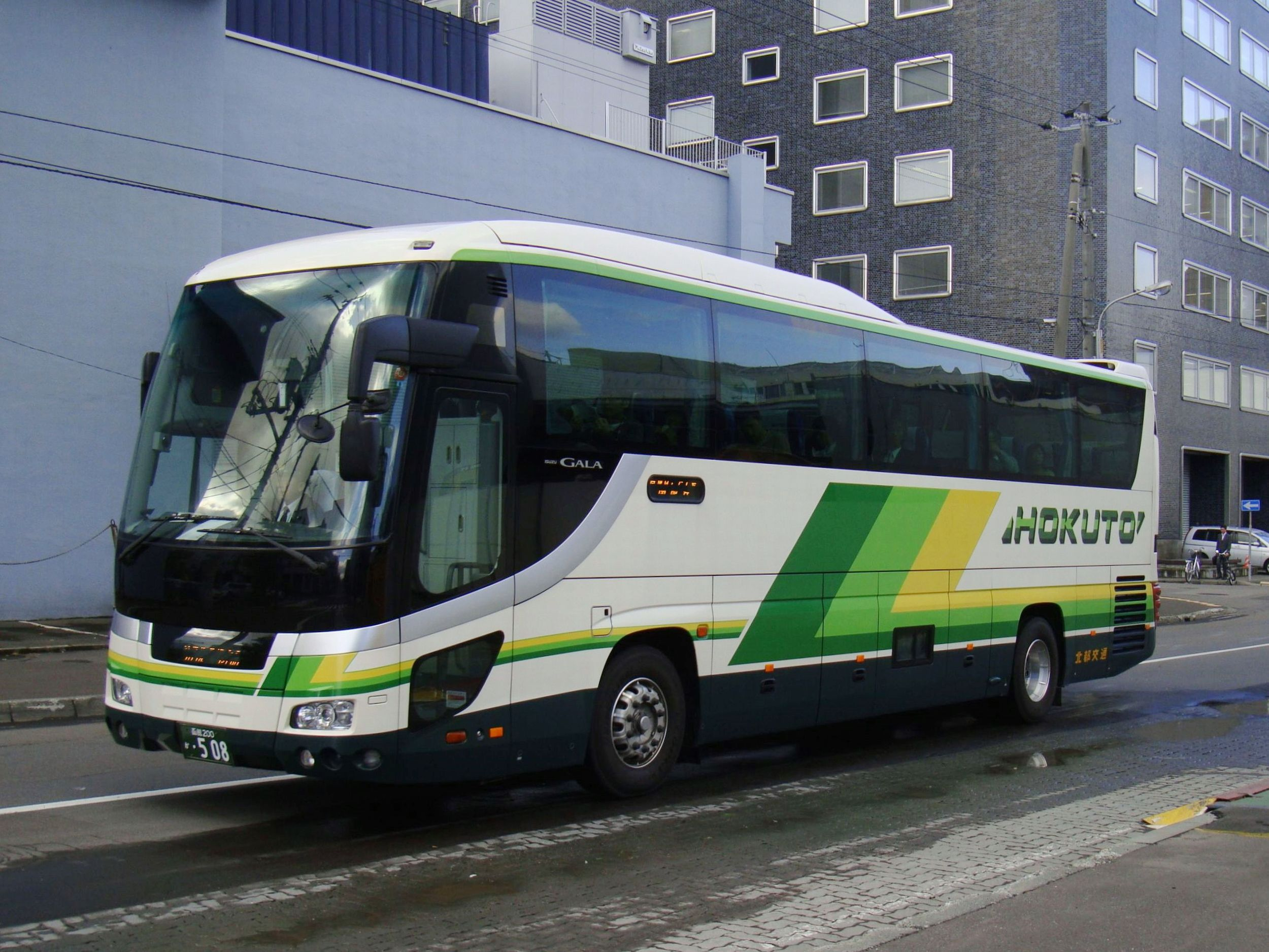 "Kōsoku Hakodate gō" From Sapporo, to Hakodate